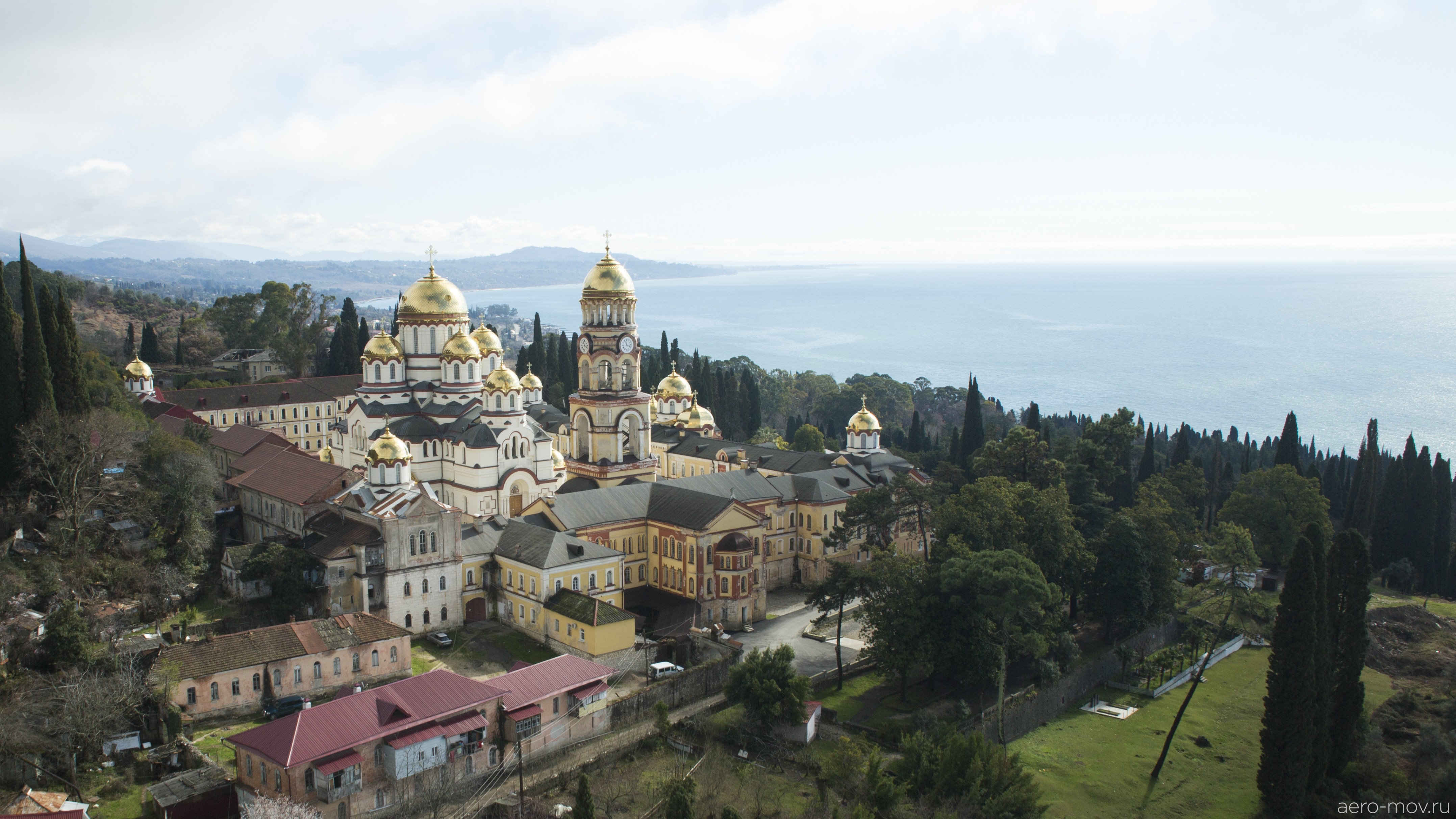 Фотография Новоафонского монастыря. Сделана 26 февраля 2015 .